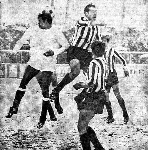 Tekma NK Maribor-Partizan. Na sliki dvoboj Mladena Kranjca (beli dres) in Mihajlovića.